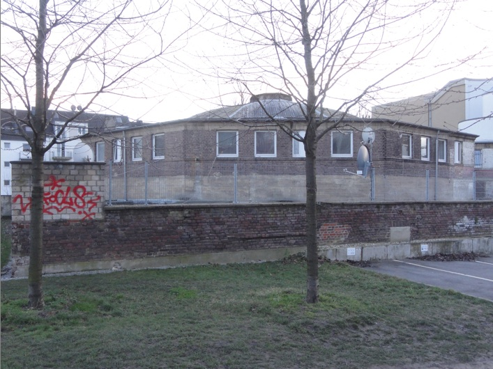 Kongressgarage, Aachen